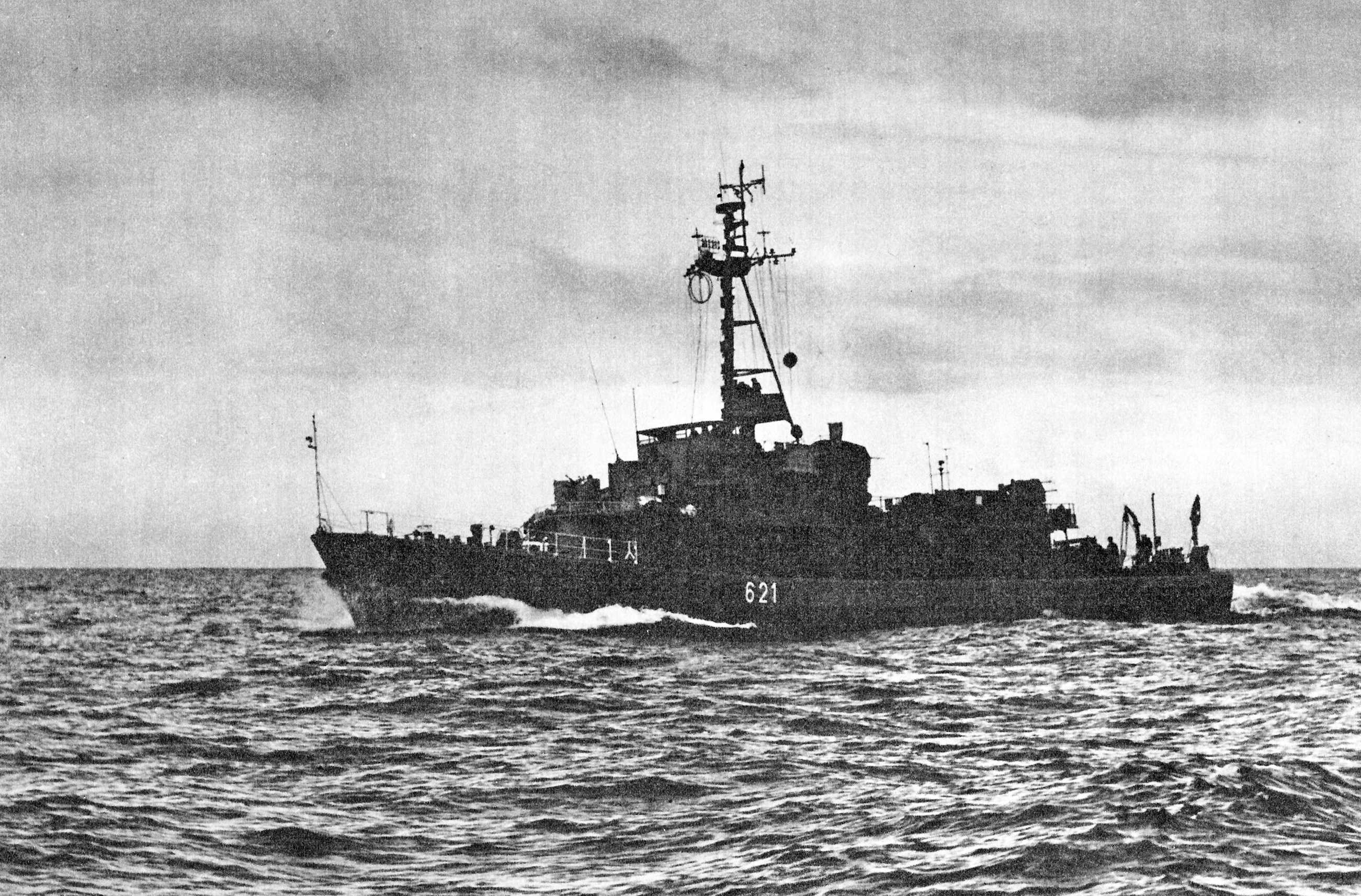 Trałowiec proj. 206F ORP "Flaming"